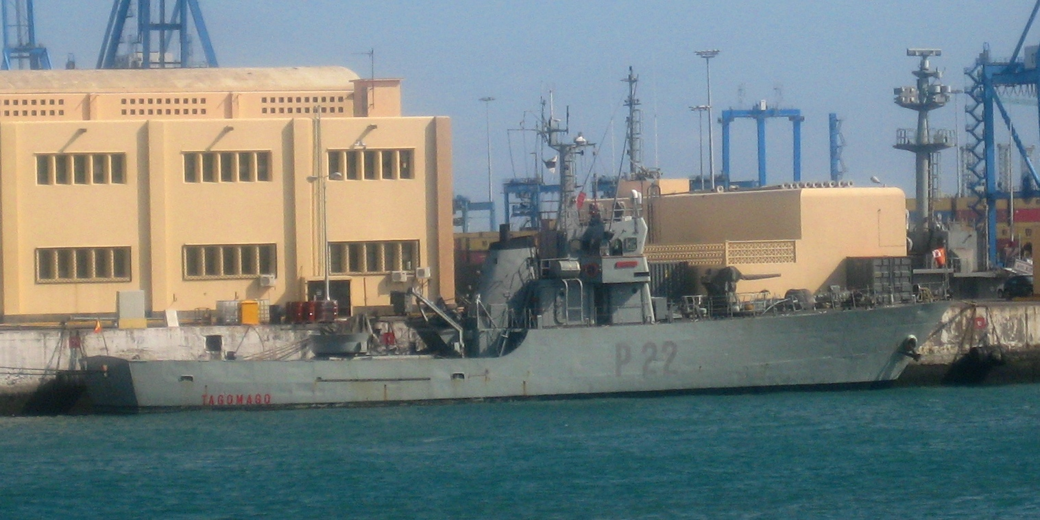 Patrullero Tagomago de la Armada Española.